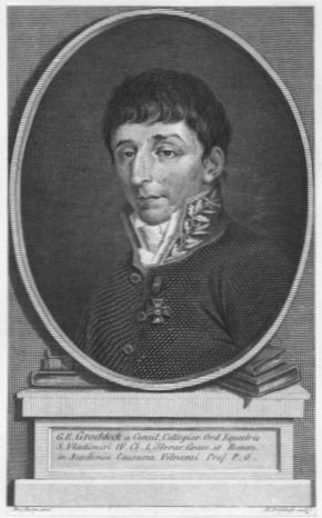 Gotfryd Ernest Groddeck